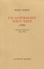 Paul Wenz Un Australien tout neuf.1908 Cover